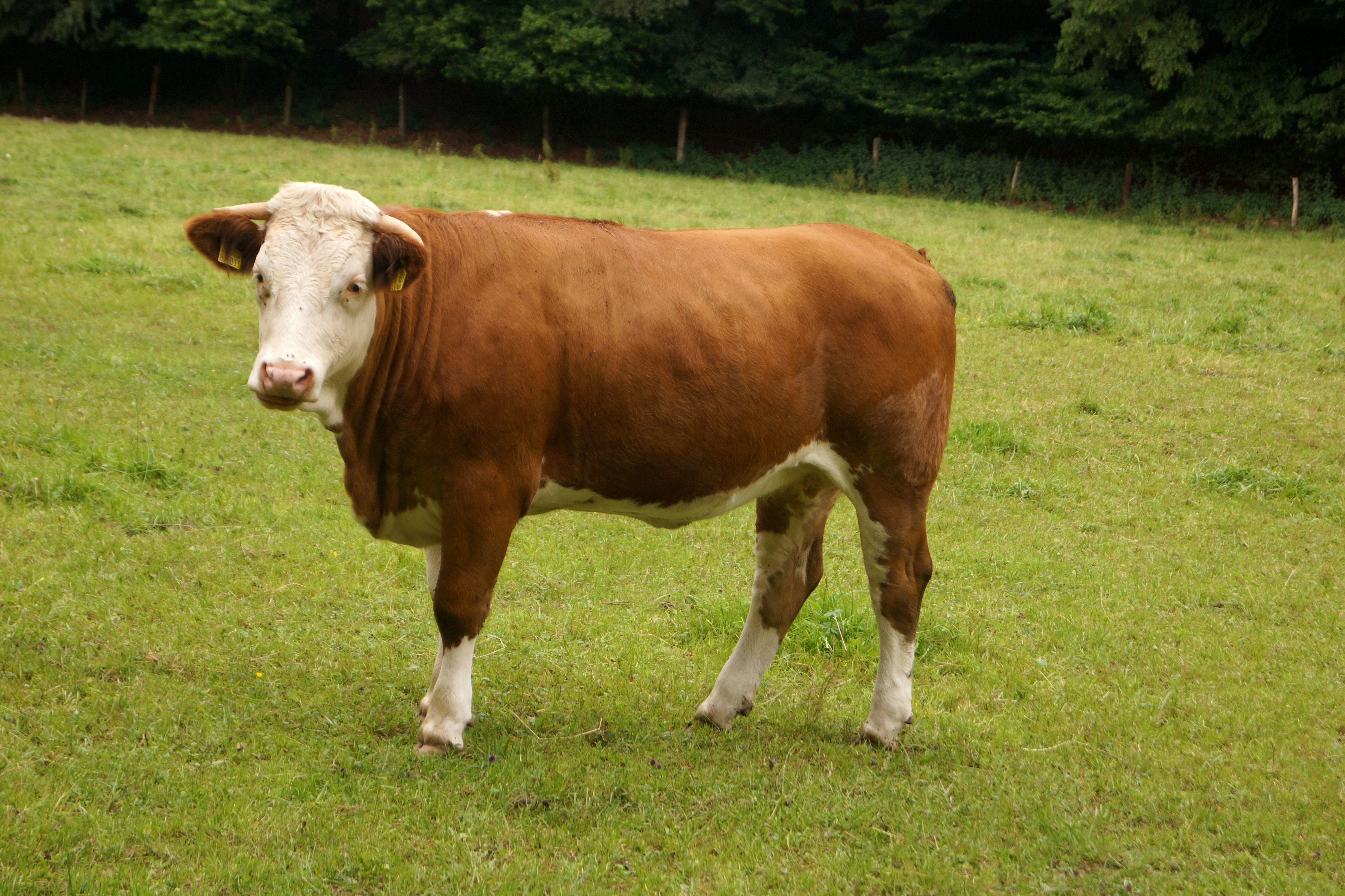 Weiderind der Rasse Fleckvieh nahe Gersfeld (Rhön)